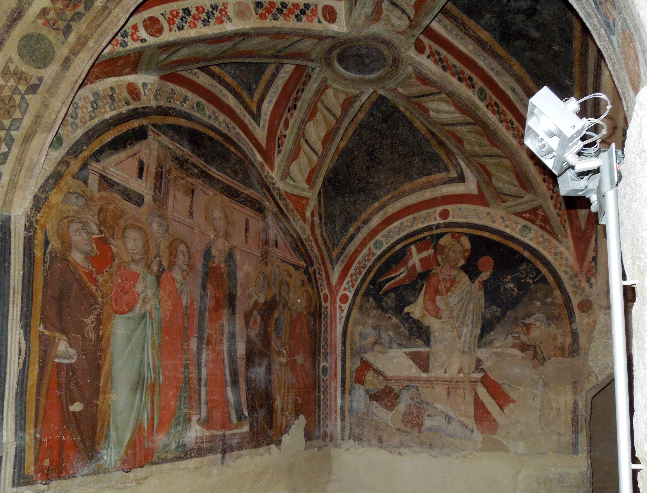 Cripta della Chiesa di Santa Maria in Platea di Campli (TE) Affreschi di Sant'Orsola e della Resurrezione. Anno 2014.